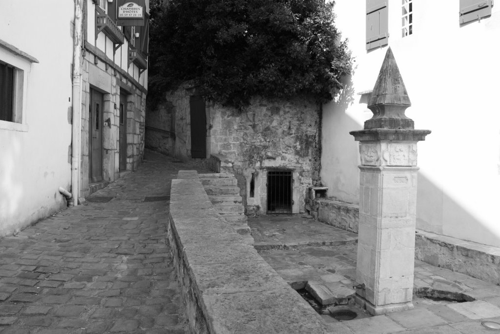 La vieille fontaine construite en 1676 était le principal lieu d'approvisionnement en eau de la commune avant l'adduction générale. En forme d'obélisque pointu de 2m de hauteur, l'eau coulait par 2 tuyaux situés à sa base. .